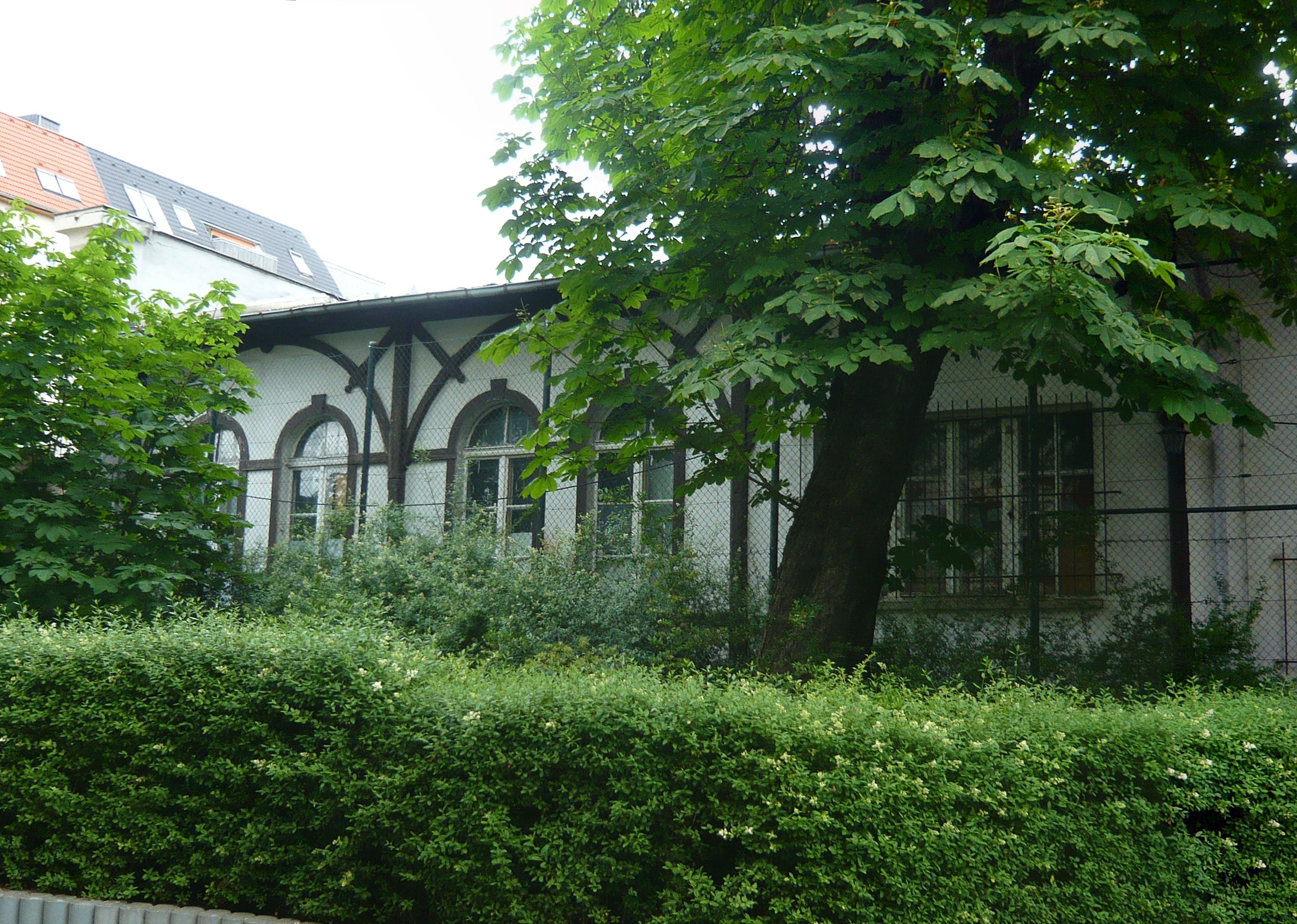 Berlin-Friedrichshain, ehemalige Brauerei Patzenhofer-Schultheiß, Rest eine eh. Gartenpavillons für den Ausschank